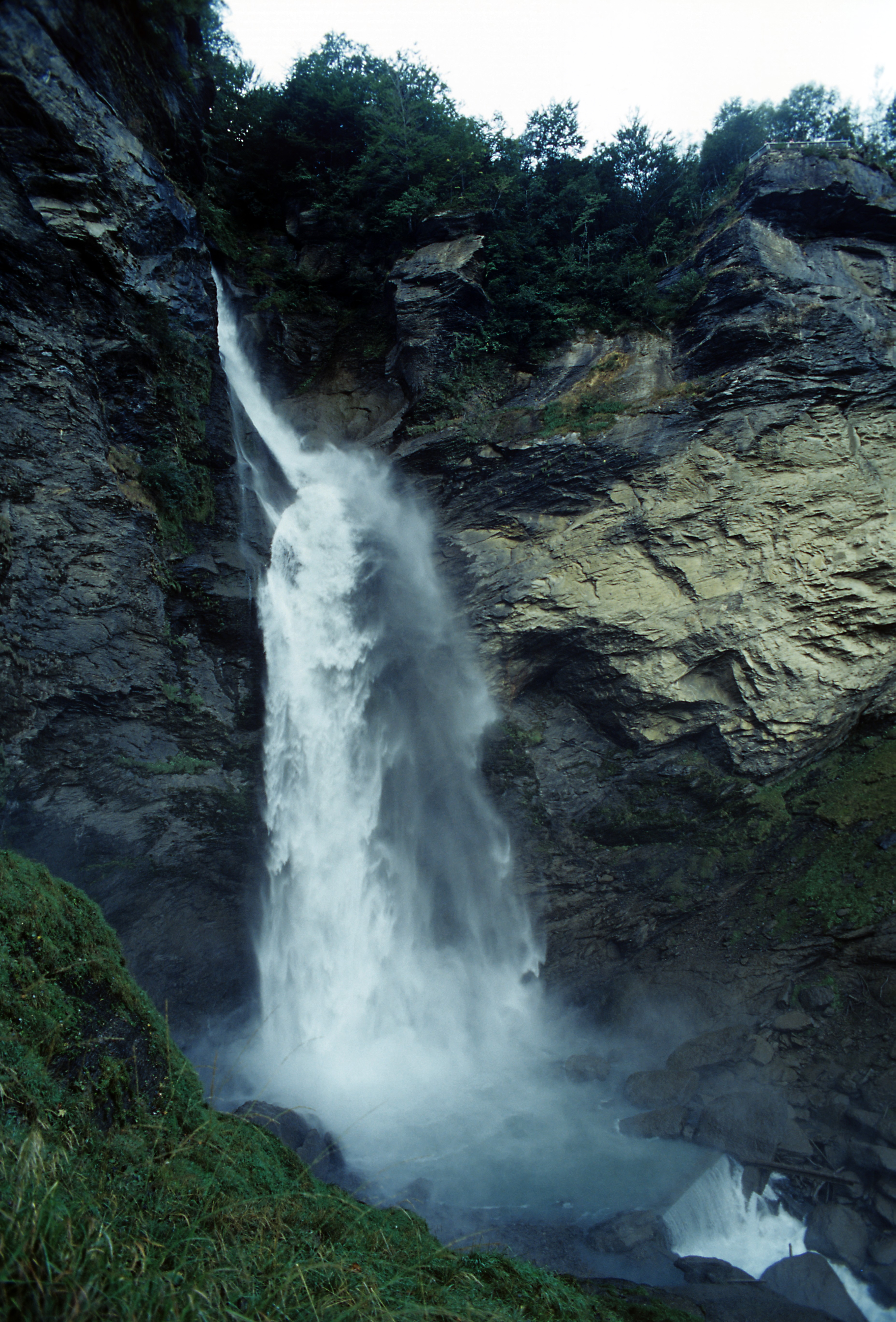 Vom Aussichtspunkt auf den orografisch rechten Ufer